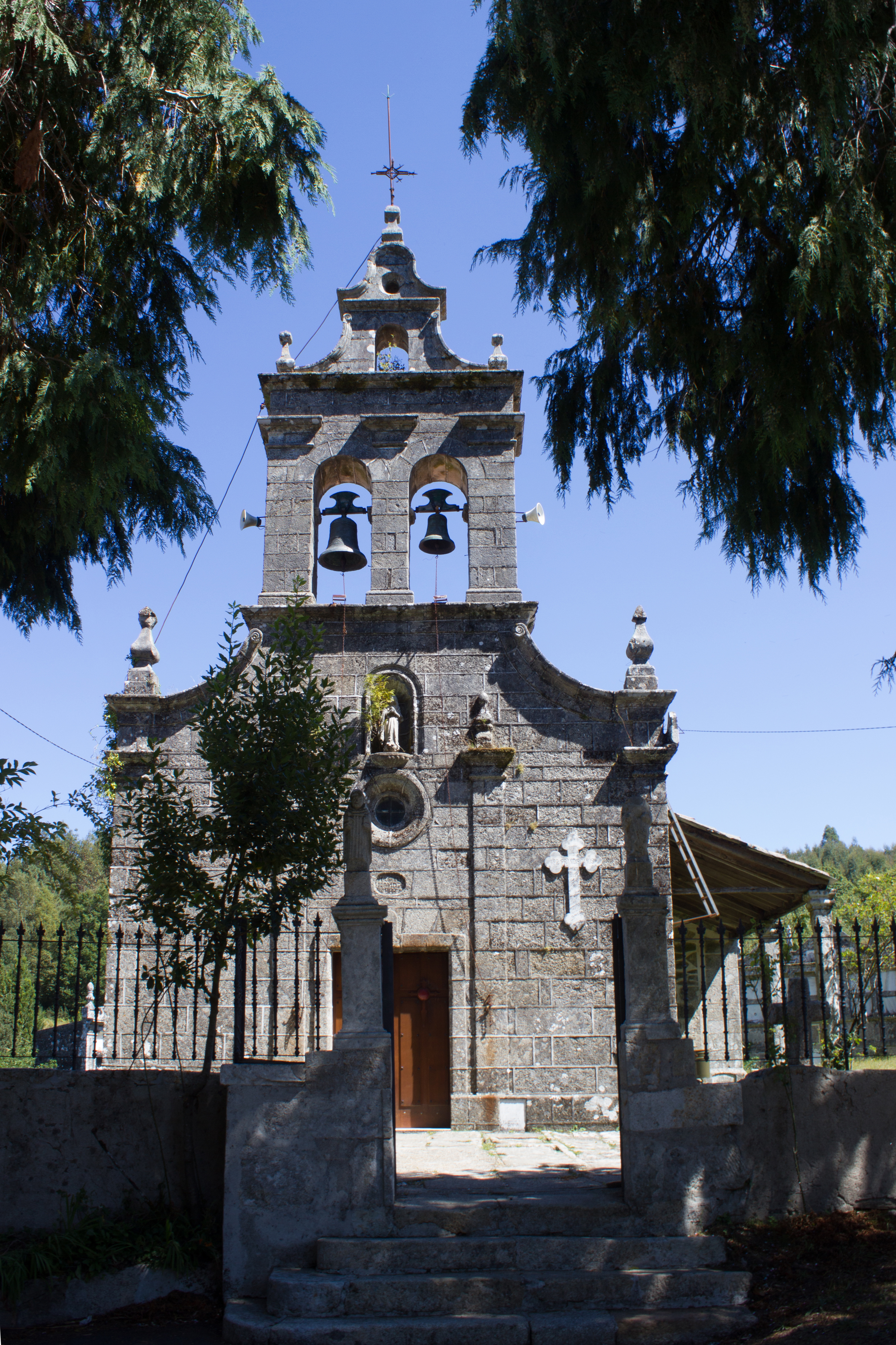 Igrexa de Santiago de Pardesoa, no concello de Forcarei.